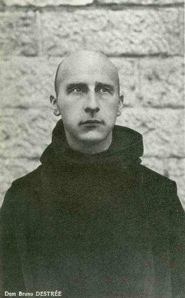 Bruno Destrée (1867–1919)